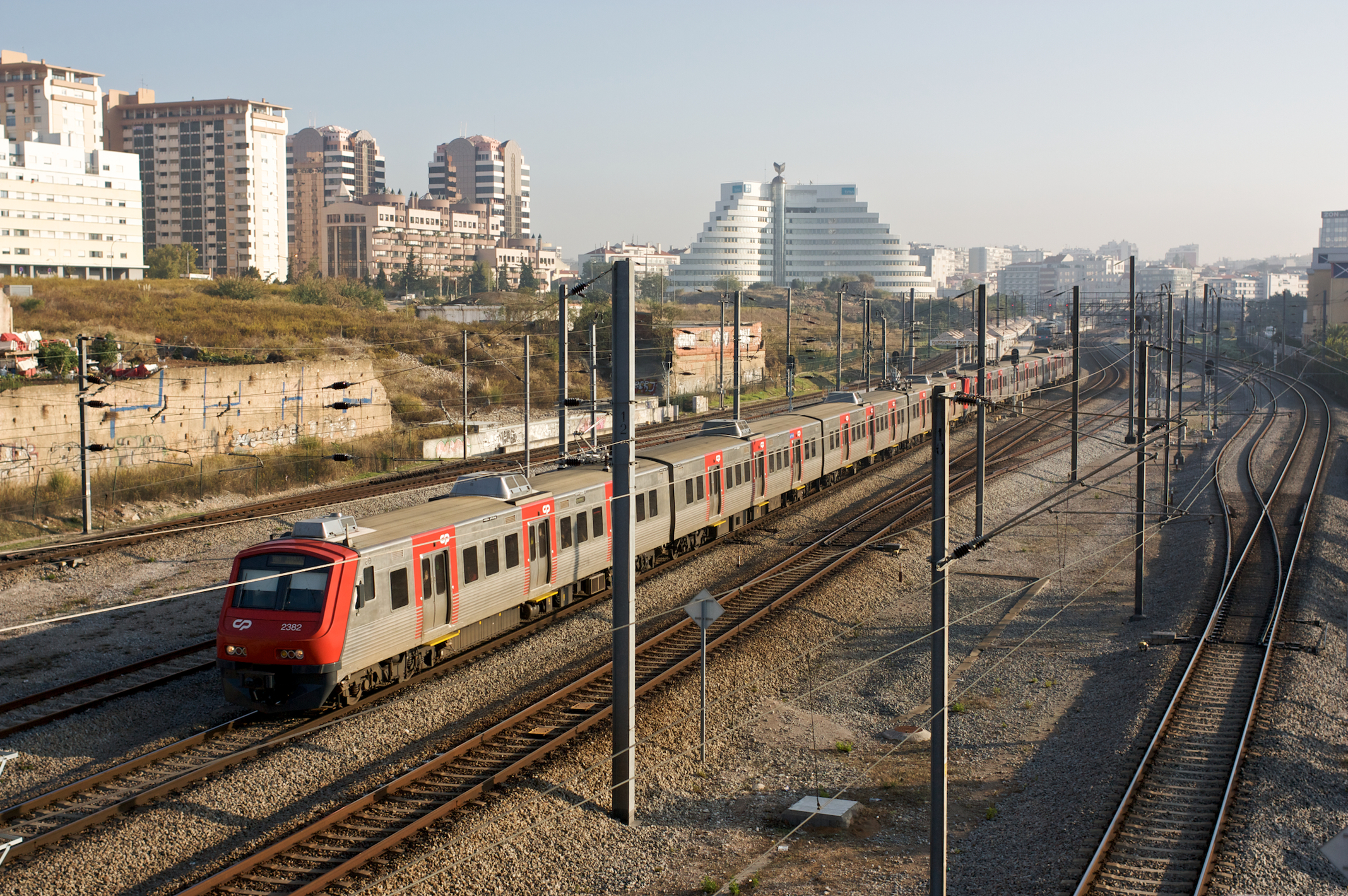 Tipo: Comboio Urbano 18410 [Alverca - Monte Abraão] Local: Rego (Lisboa) [Linha de Cintura, PK 5] Data e hora: 16 de Outubro de 2010 [09h21] Material: Automotoras 2333 e 2323 [Unidades Quádruplas Eléctricas]